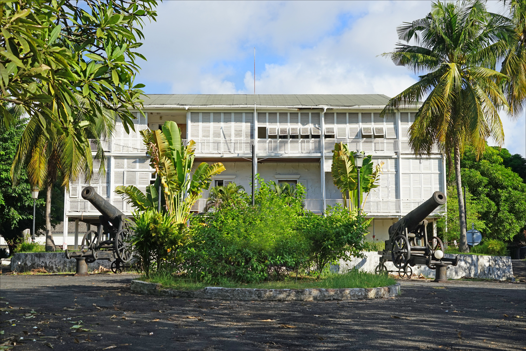 Dans les années qui viennent, il est prévu que le musée, actuellement hébergé dans l'ancienne caserne, soit définitivement installé dans l'hôtel du gouverneur (la Résidence) construit sur "le Rocher" à l'emplacement du palais du sultan Andriantsouly qui a vendu Mayotte à la France en 1841. L'hôtel du gouverneur, avec ses vantaux et sa structure métallique est un vestige de l'époque coloniale. L'édifice appartient au conseil départemental, il est actuellement désaffecté, notamment en raison de la présence de termites qui ont fortement fragilisé les parties en bois. Le bâtiment est en attente de restauration. L'inauguration du musée en 2015 Le musée de Mayotte dépend du conseil départemental de Mayotte (101ème département français depuis le 31/03/2011)